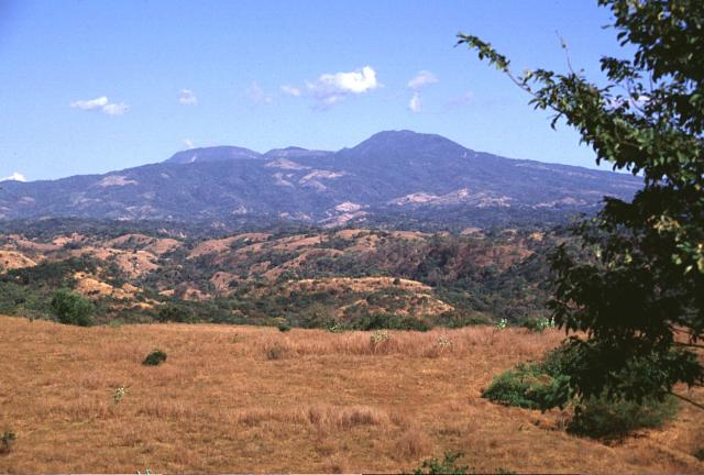 Tecapa is a complex stratovolcano in eastern El Salvador.